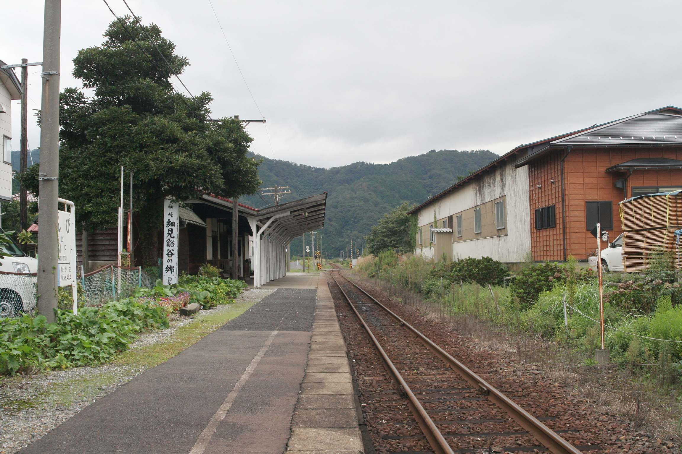 若桜鉄道 丹比駅の構内